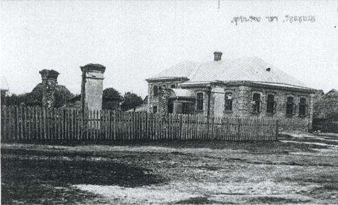 Беларуская (тарашкевіца): Антопаль (Antopal). Руіны сынагогі, направа — юдэйская малітоўная школа